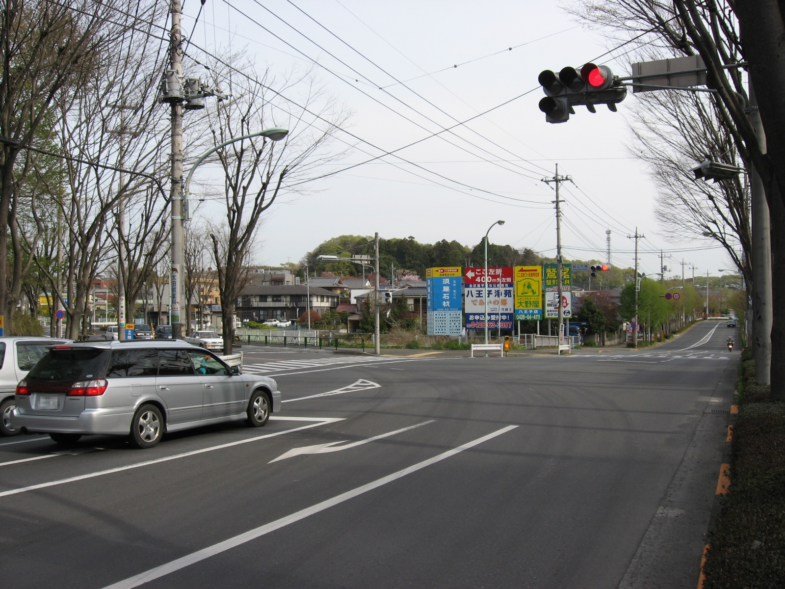 城山大橋交差点 (東京都道46号八王子あきる野線と東京都道61号山田宮の前線の交点)